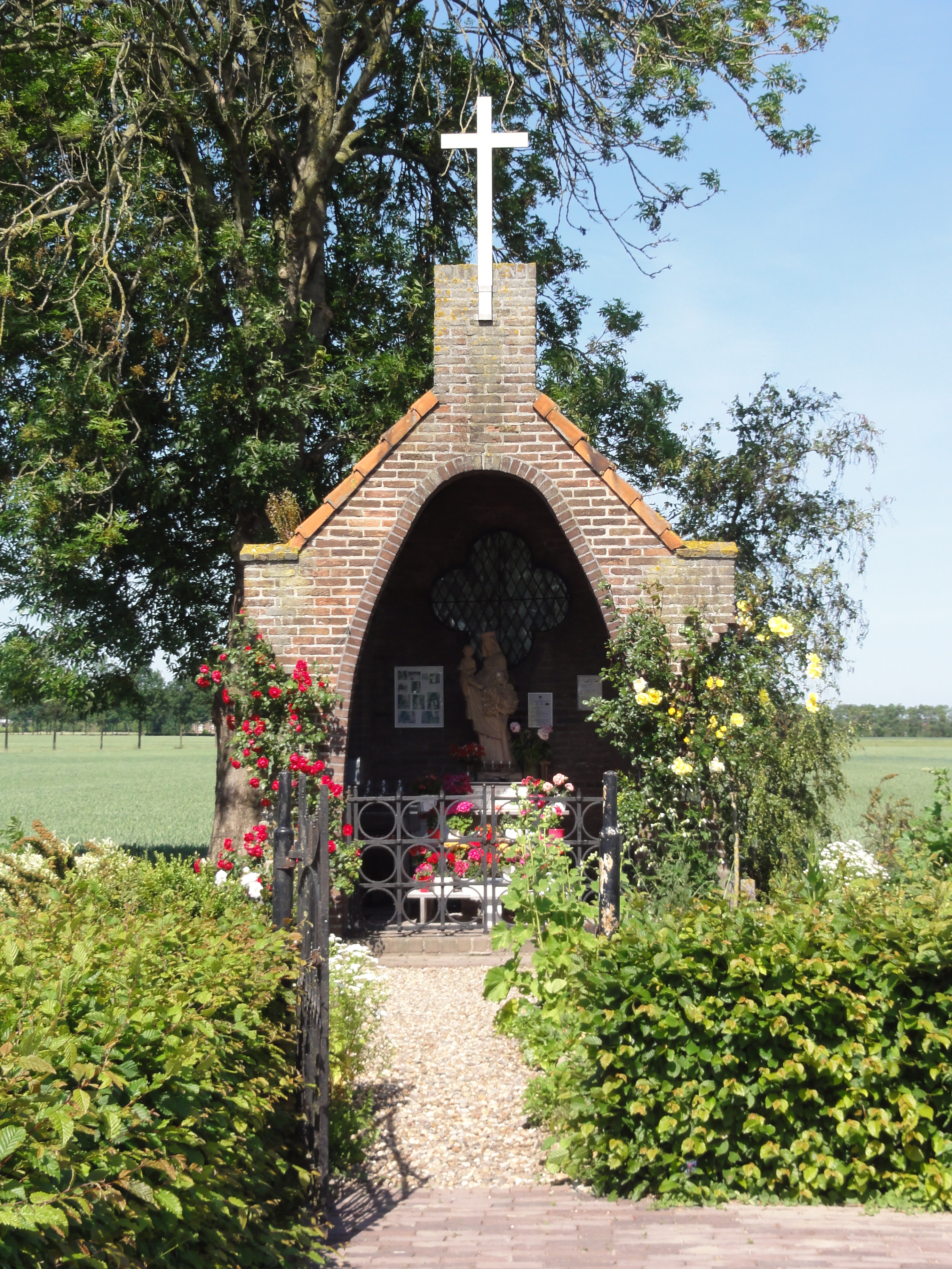 Bemmel (Lingewaard) gedachteniskapel op de heuvel - Bemmel, Heuvelsestraat 14 - O.L.Vrouw van de Bloeiende Betuwe - ook wel Onze Lieve Vrouw van de Heuvelkapel